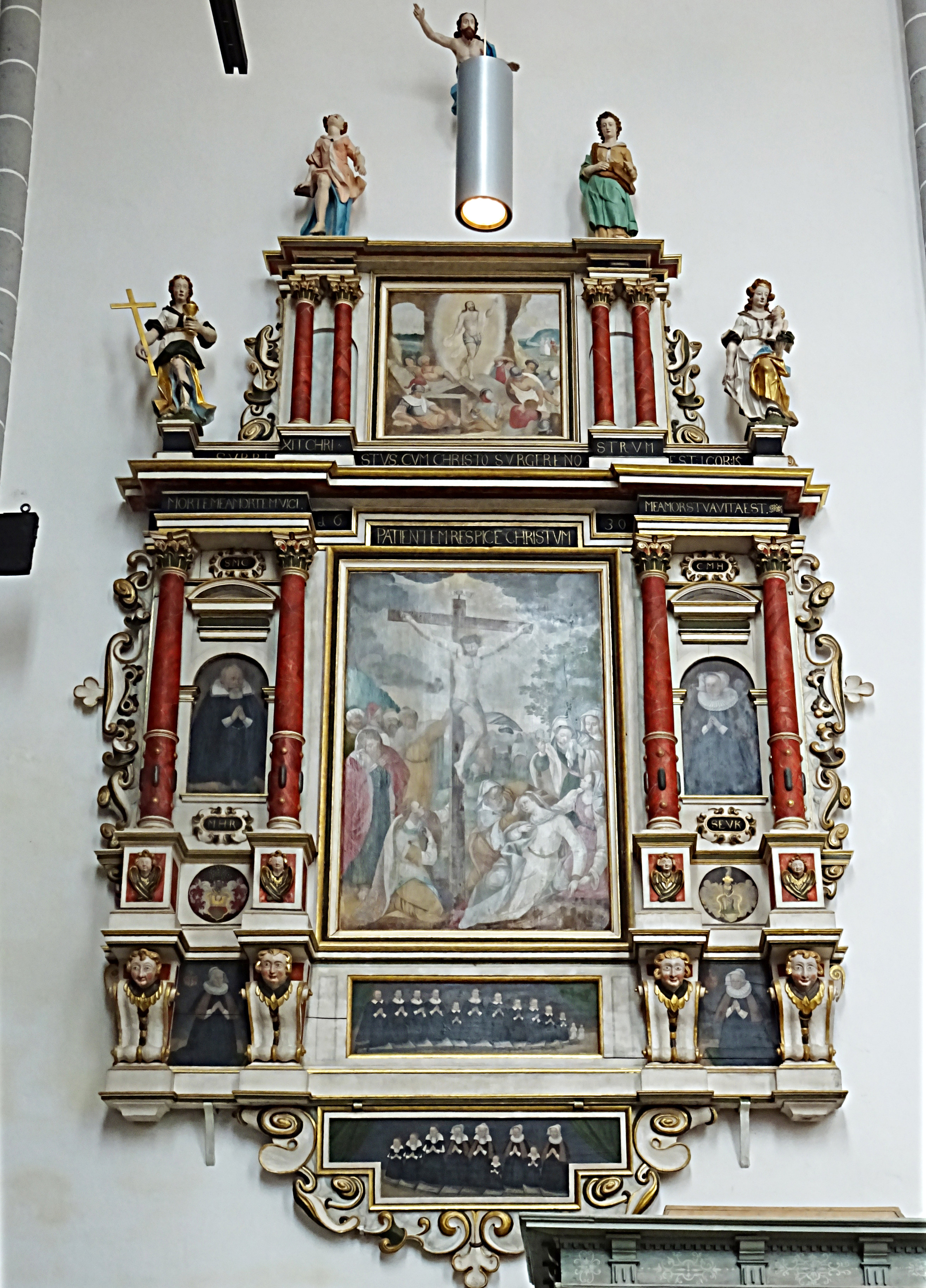 Epitaph für Melchior Heidenreich in der Stadtkirche St. Peter und Paul (Weißensee)